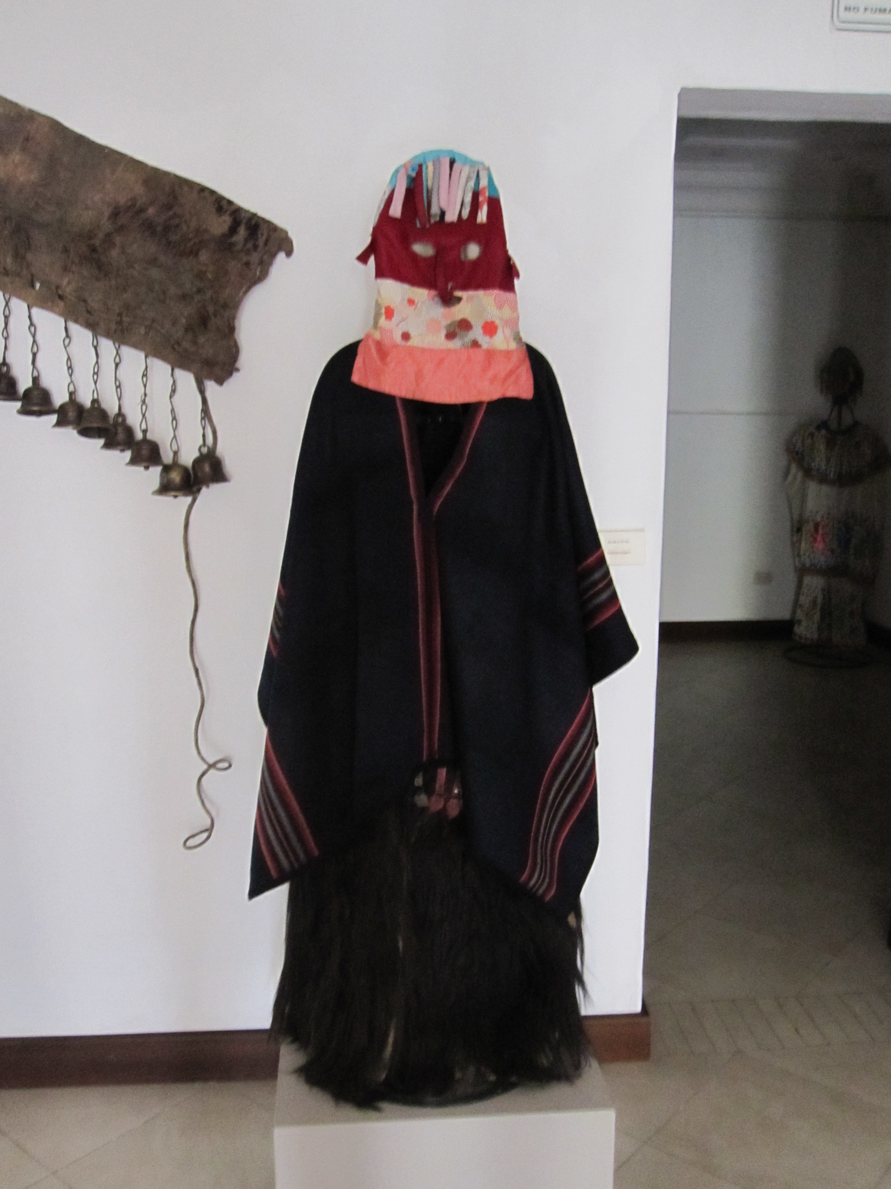 Diablo Huma, Pichincha, Ecuador